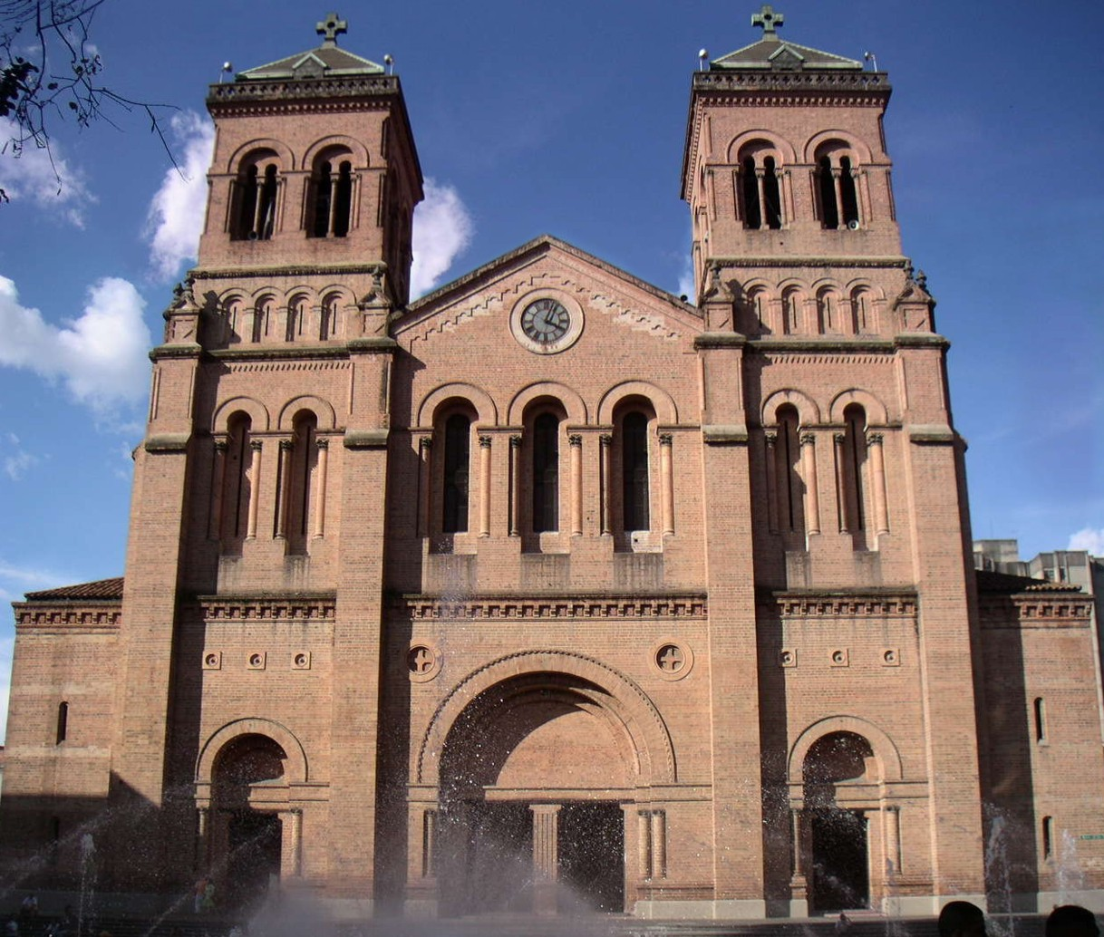 Fachada Principal de la Catedral Metropolitana de Medellín. Colombia